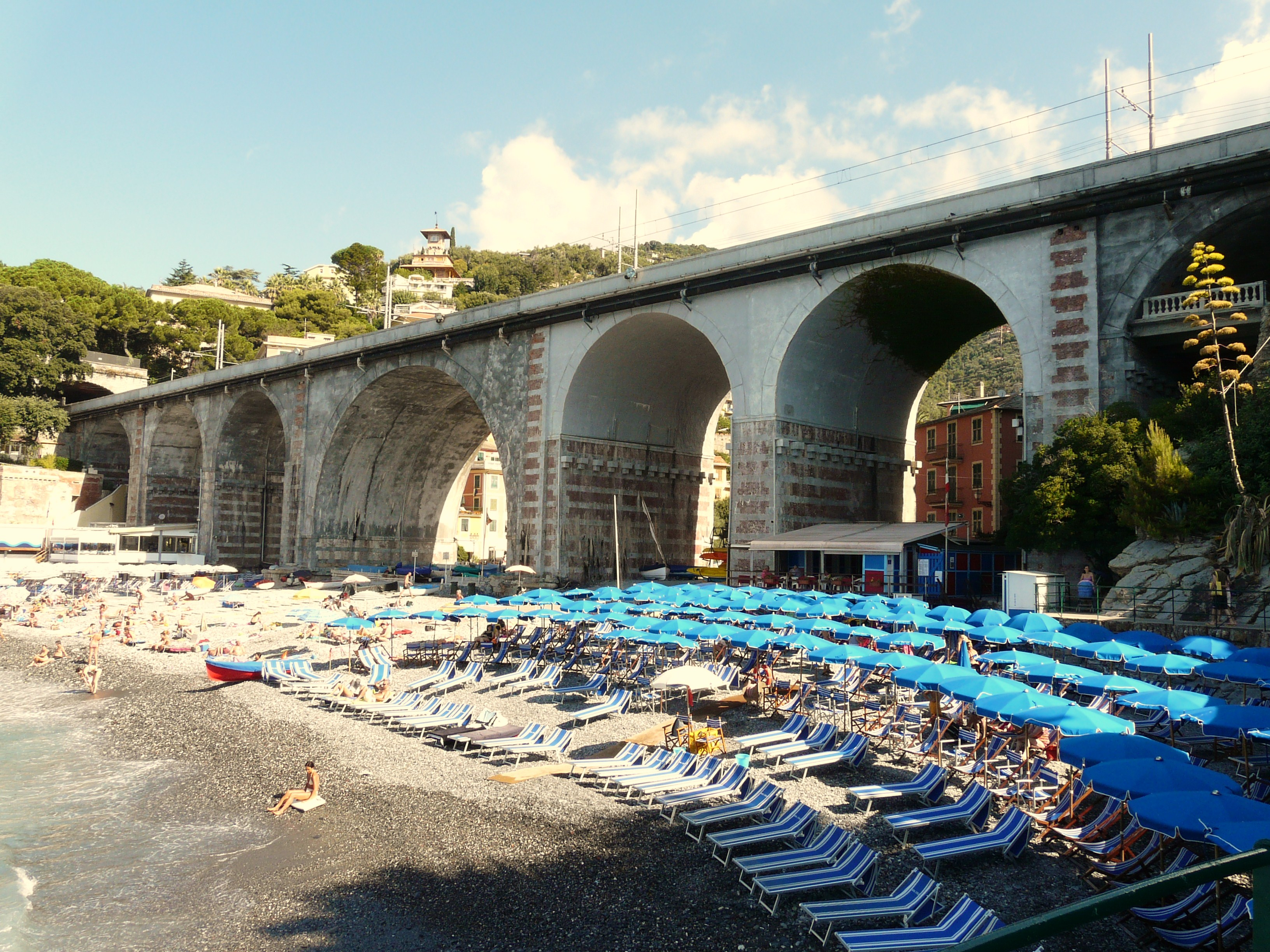 Ponte ferroviario, Zoagli, Liguria, Italia